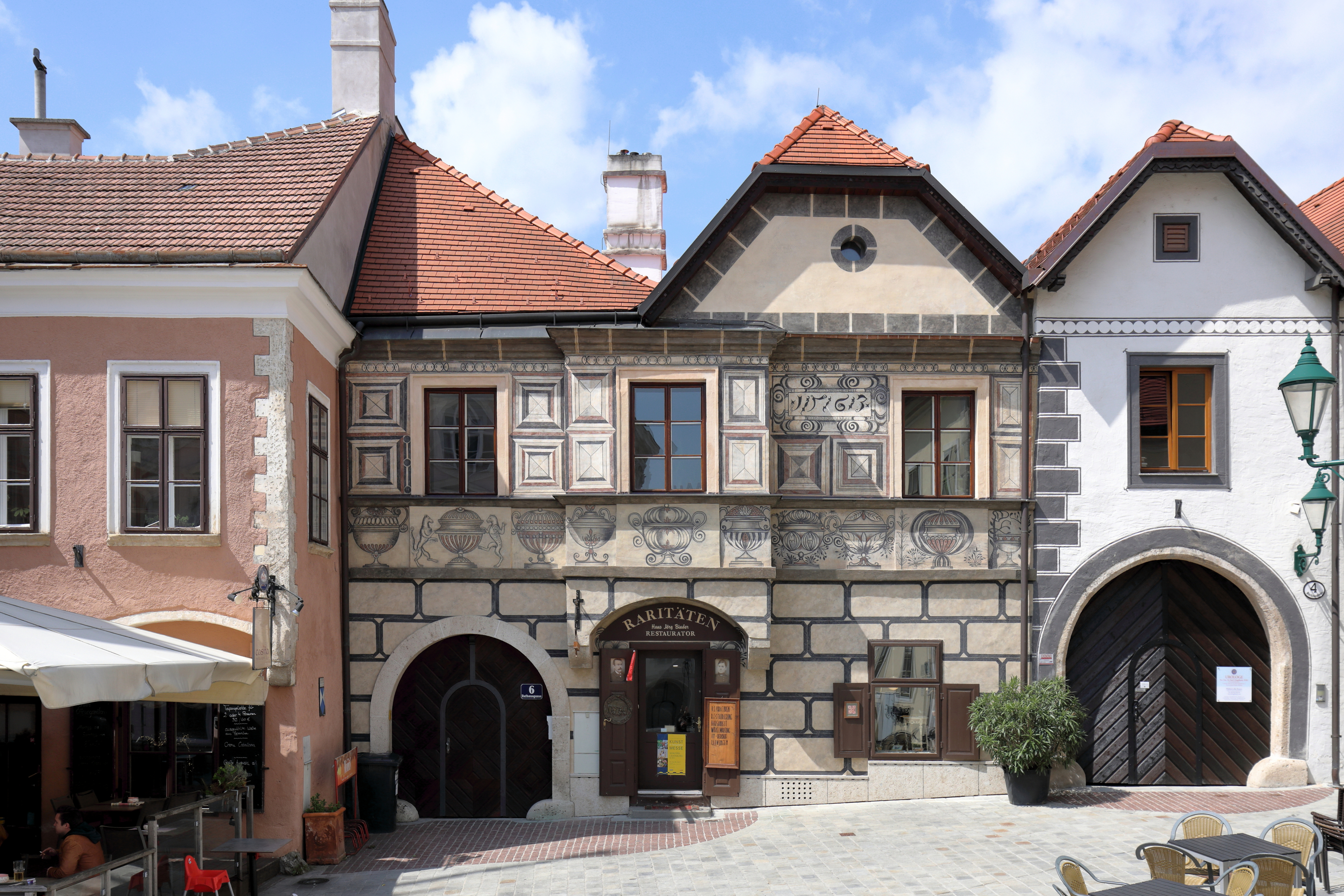 Bürgerhaus an der Adresse Rathausgasse 6 in der niederösterreichischen Bezirkshauptstadt Mödling.Das Haus ist in der Substanz spätmittelalterlich und urkundlich 1439 erwähnt. Im 16. und 17. Jahrhundert wurde es um- und ausgebaut. Die reiche, plastische Fassadengestaltung erfolgte mittels imitierender Grisaillemalerei mit der Scheinarchitekturelemente, Diamantenquaderungen und ein Vasenfries dargestellt werden sowie die Jahreszahl „1563“.